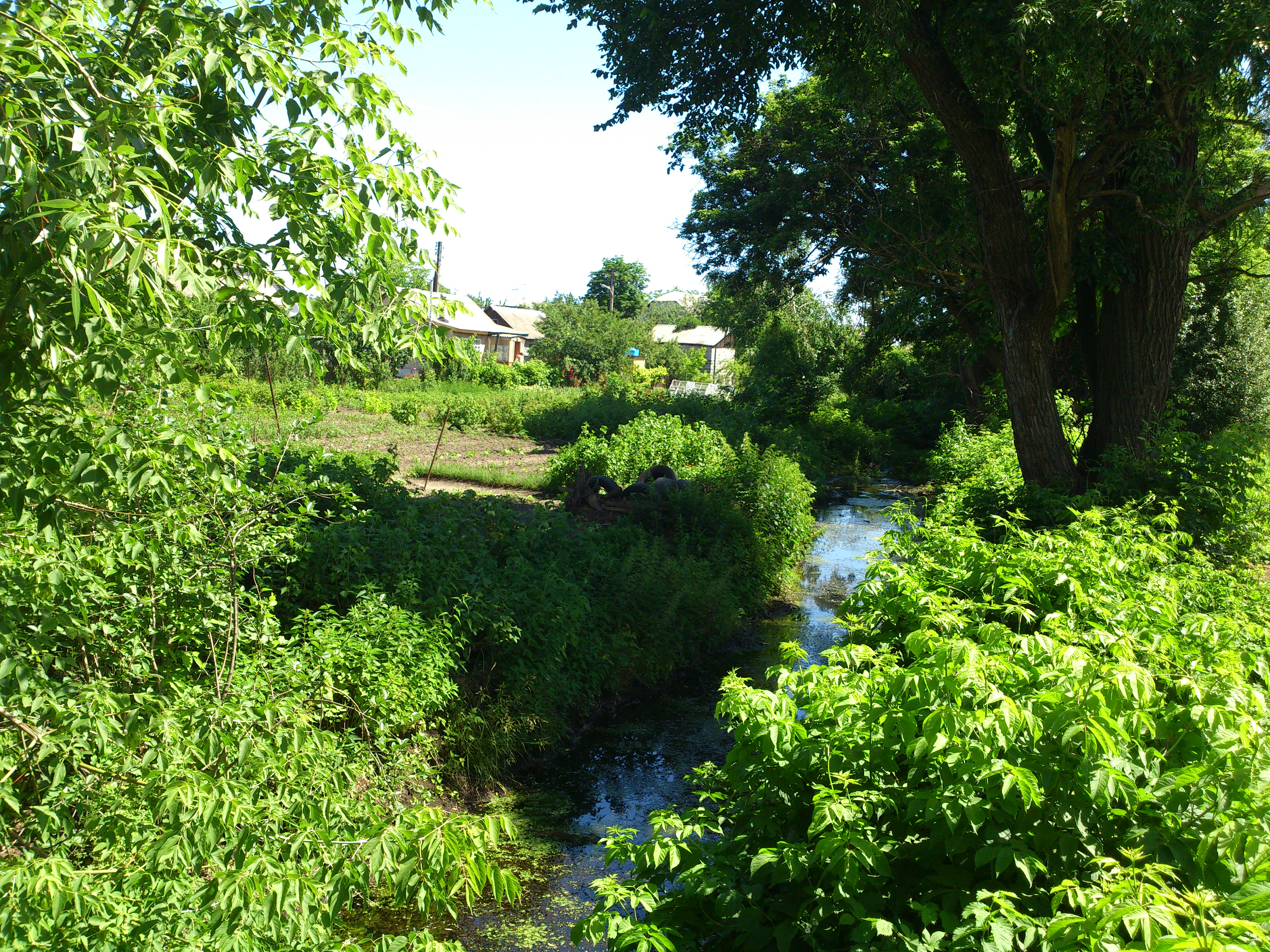 Река Жихорец в посёлке Жихарь (Харьков).